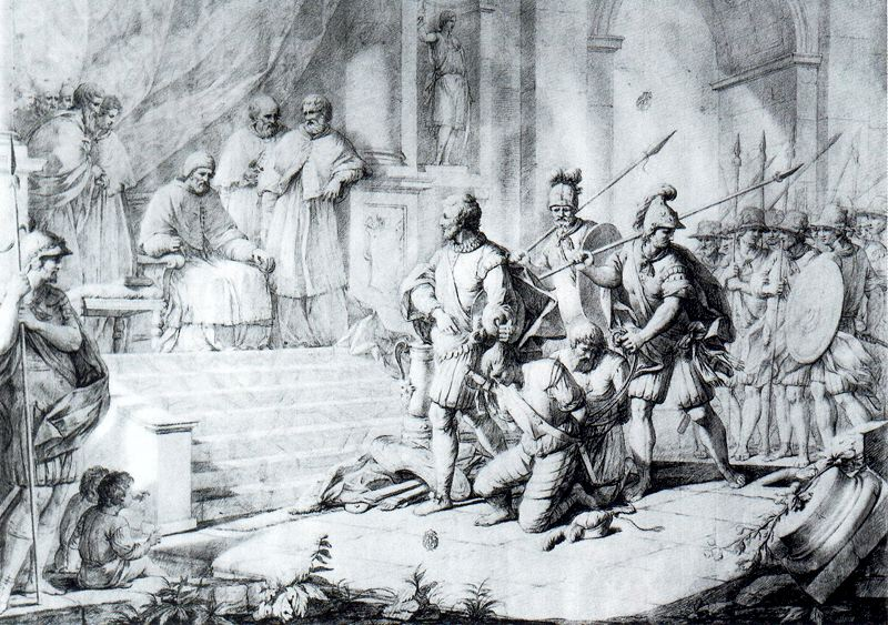 El Gran Capitán ante el papa Alejandro VI. 1778. Zacarías González Velázquez. Museo de la Real Academia de Bellas Artes de San Fernando. Madrid.